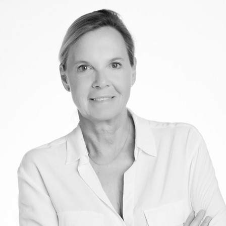 MT von Seidlein